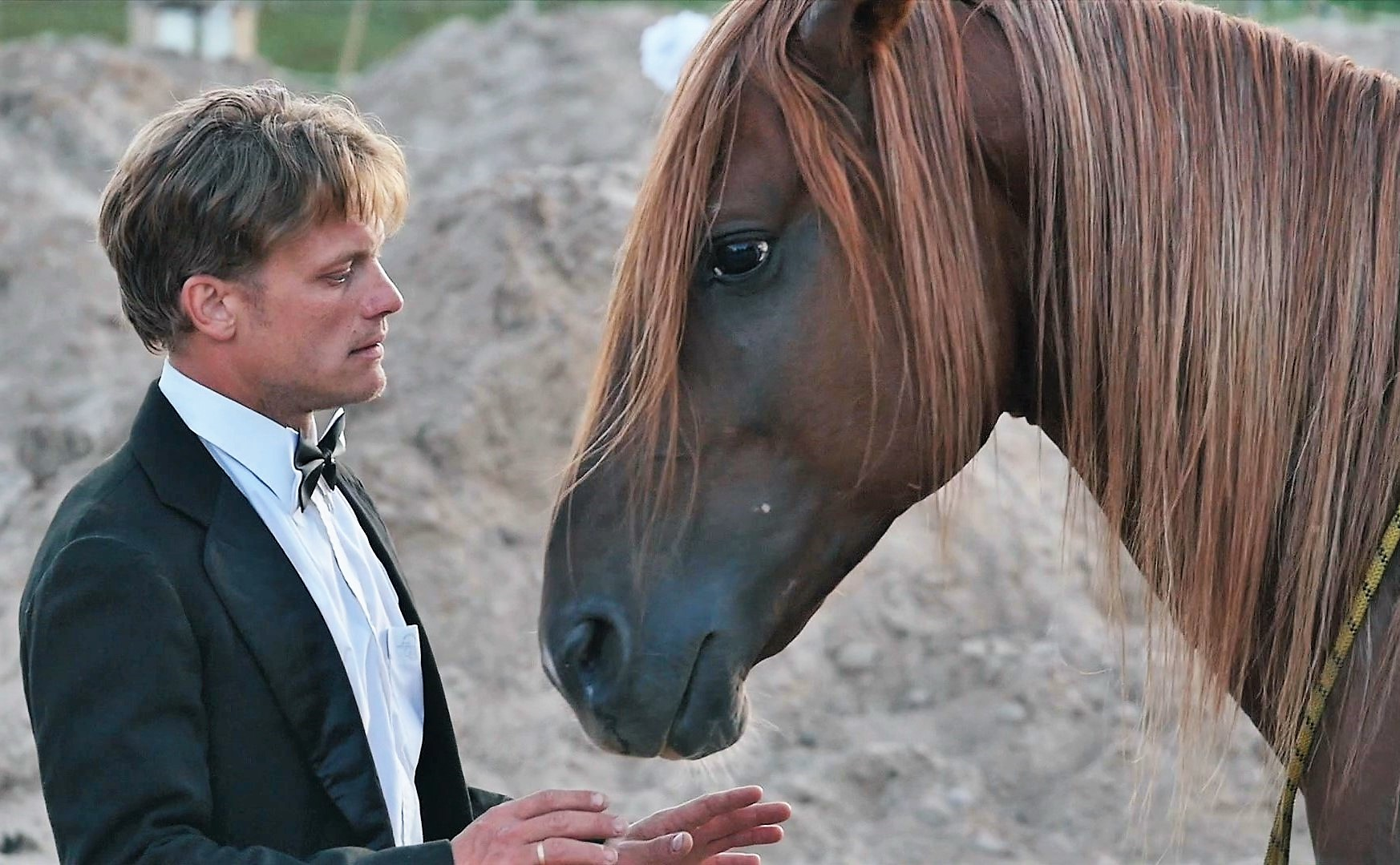 Евгений Ткачук с артистом конной труппы театра "ВелесО", июль 2018